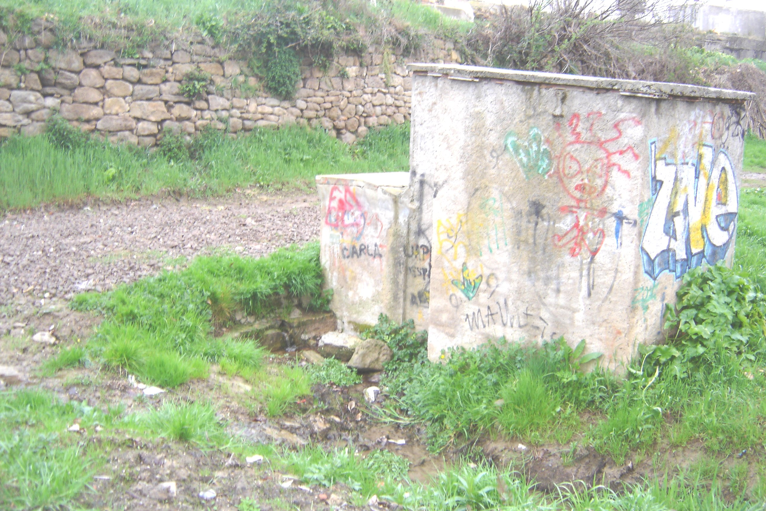 la font i el fou del Molí dels Capellans, a Solsona (Solsonès)